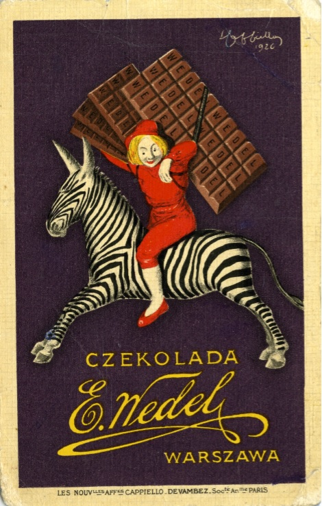 Plakat Leonetto Cappiello na zlecenie Jana Wedla